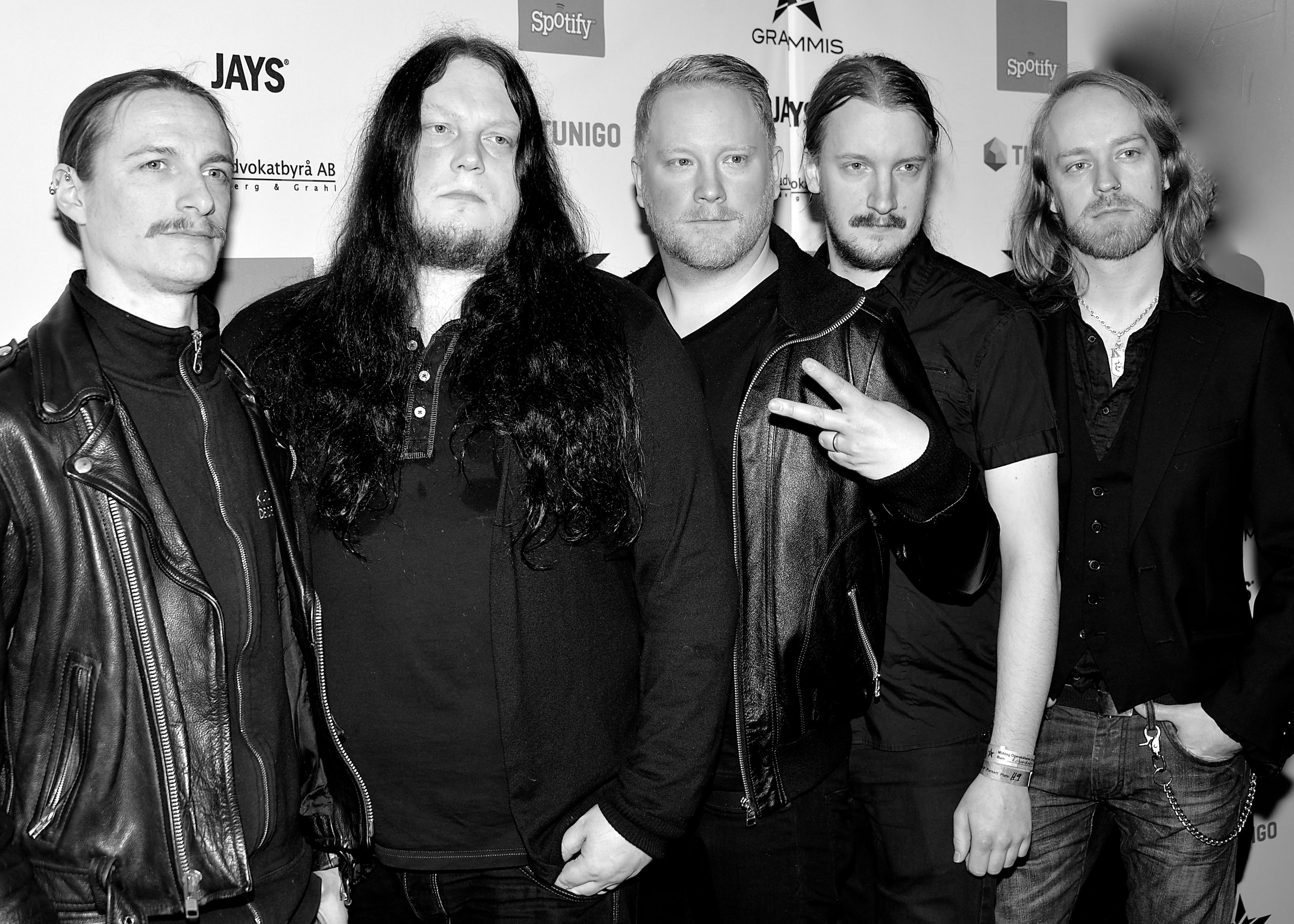 Katatonia på Grammisgalan på Cirkus, Stockholm den 20 februari 2013.